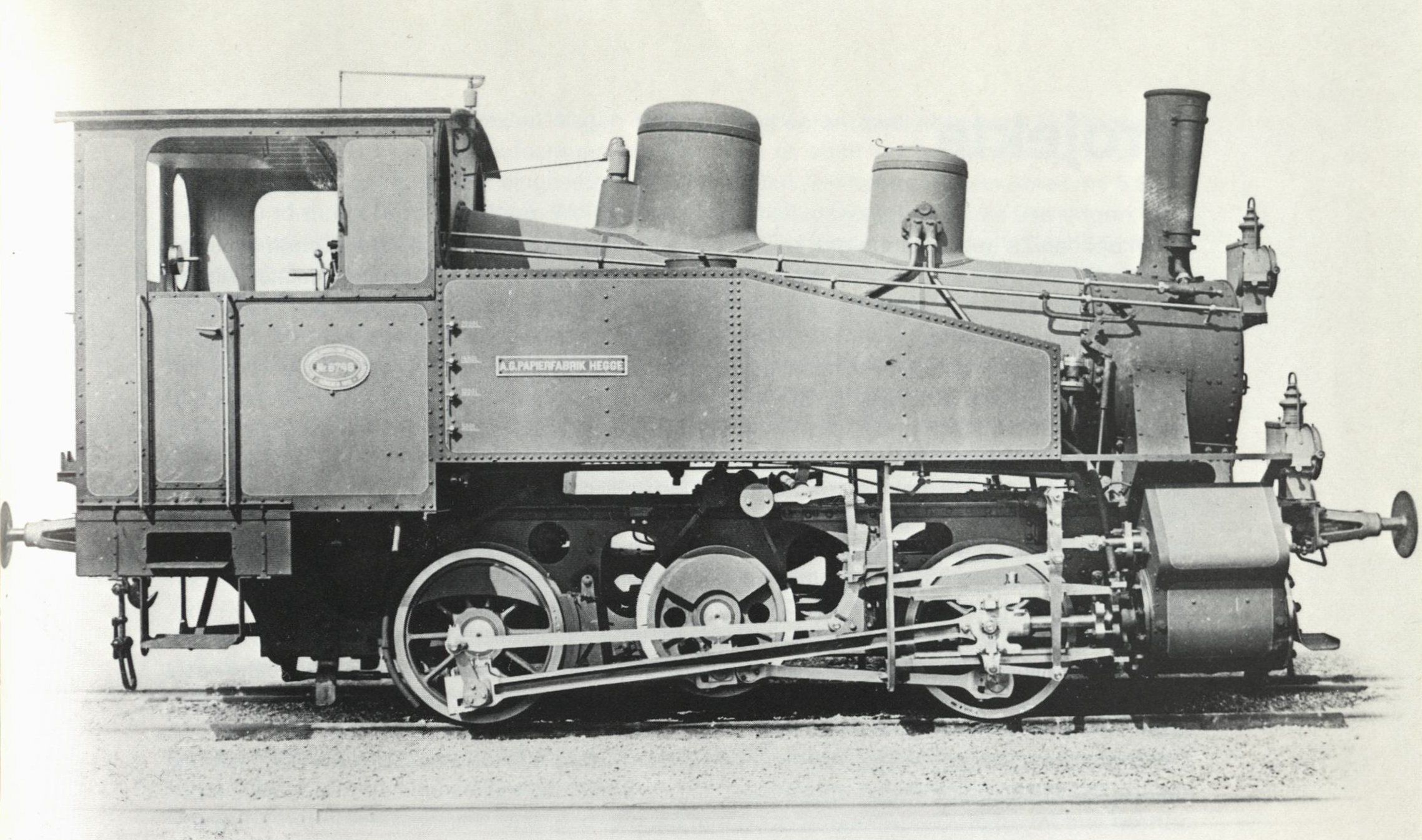 Zahnradlokomotive 6749 der Kinsauer Zahnradbahn im Ablieferungszustand 1913 bei Krauss & Co.